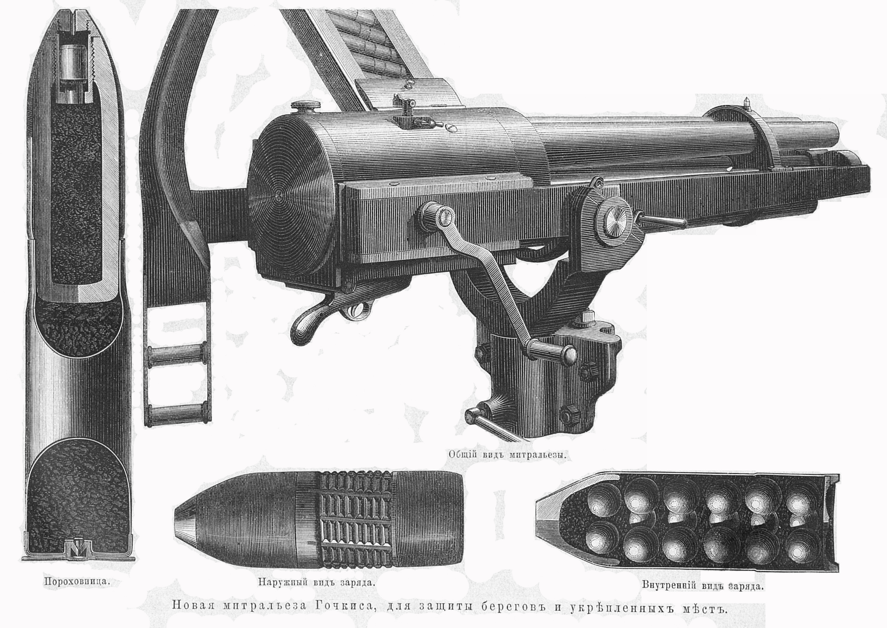 Митральеза Гочкиса - многоствольная пушка